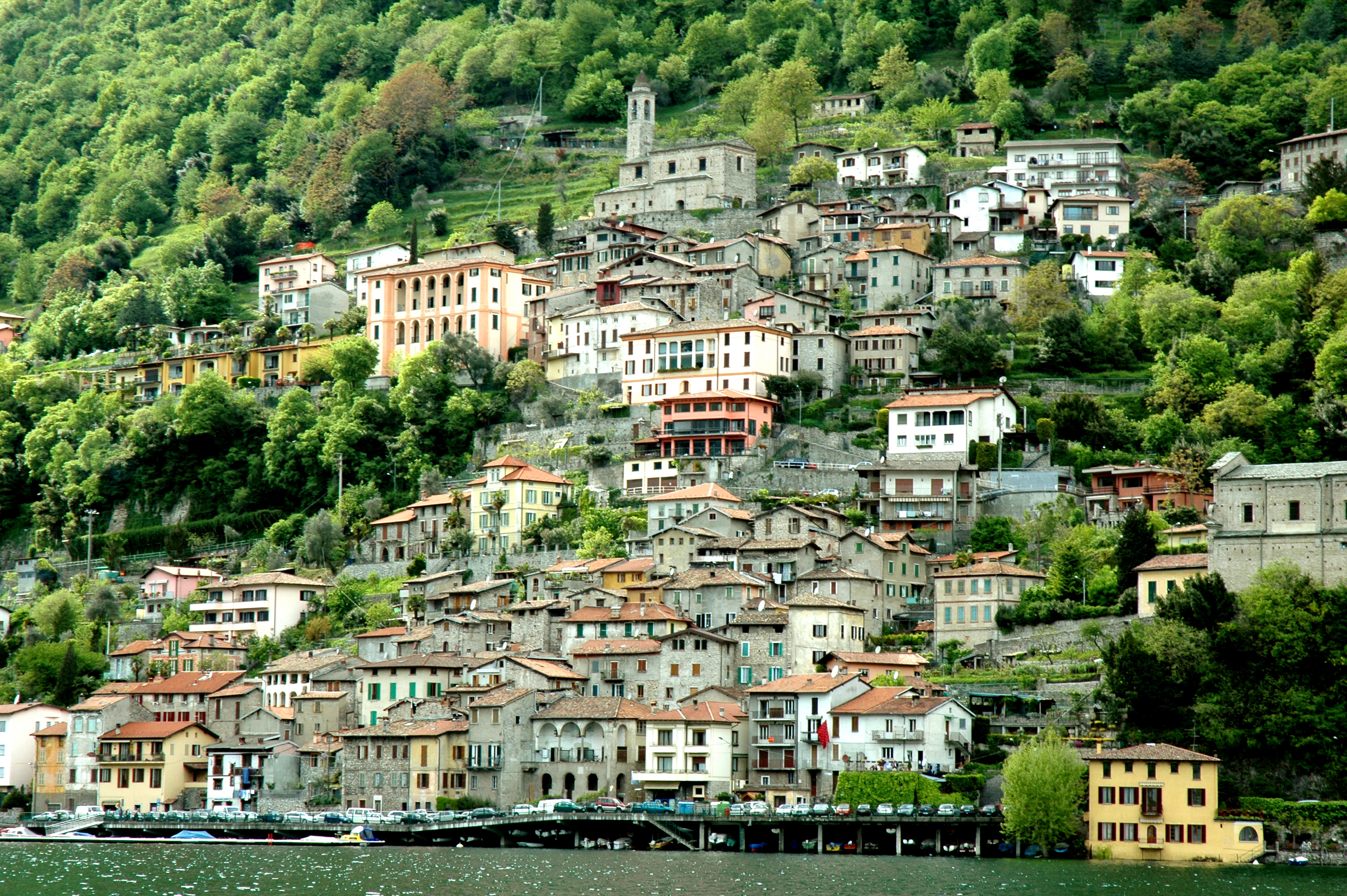 Albogasio.